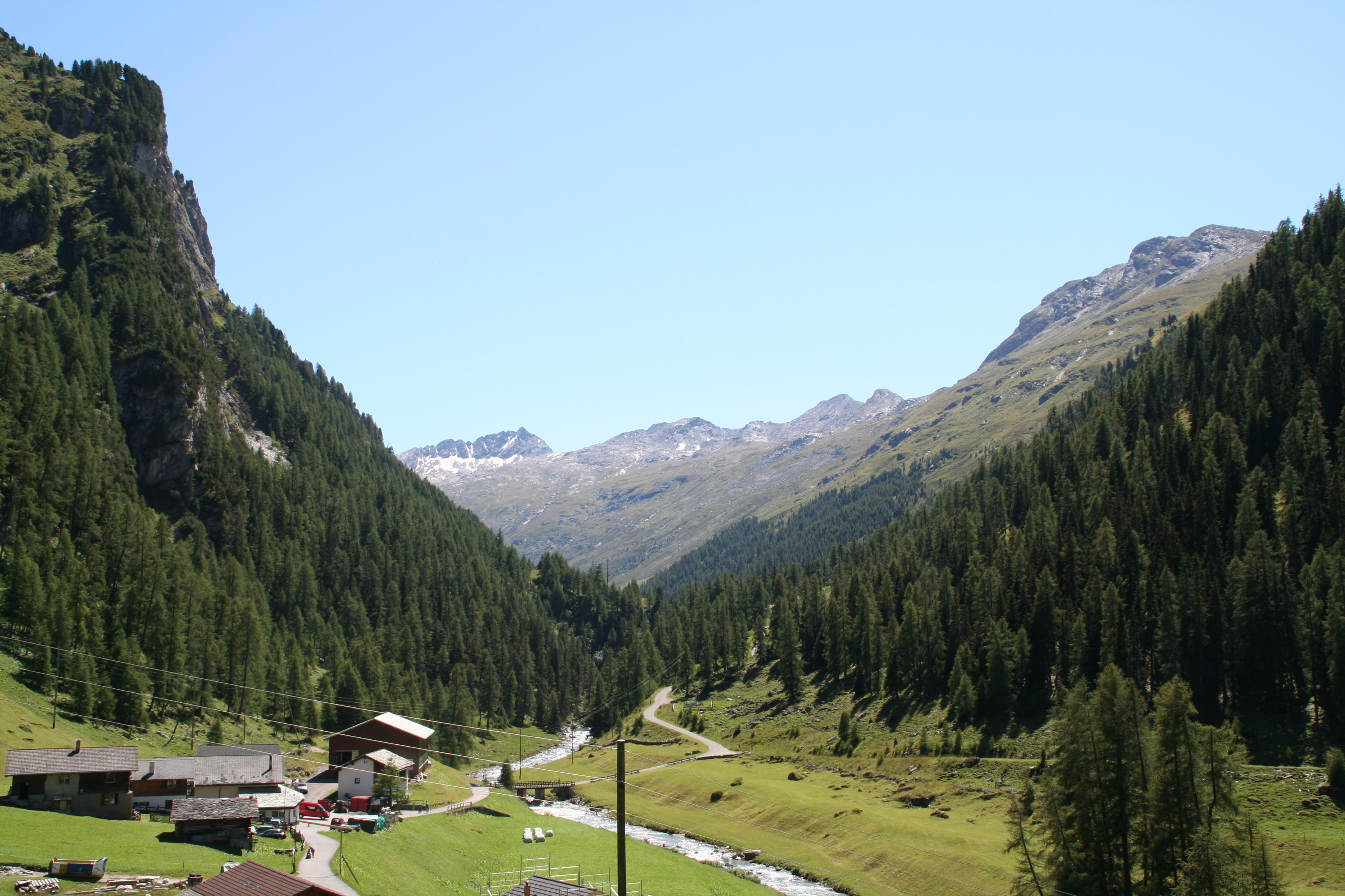 Seitental Madrisch